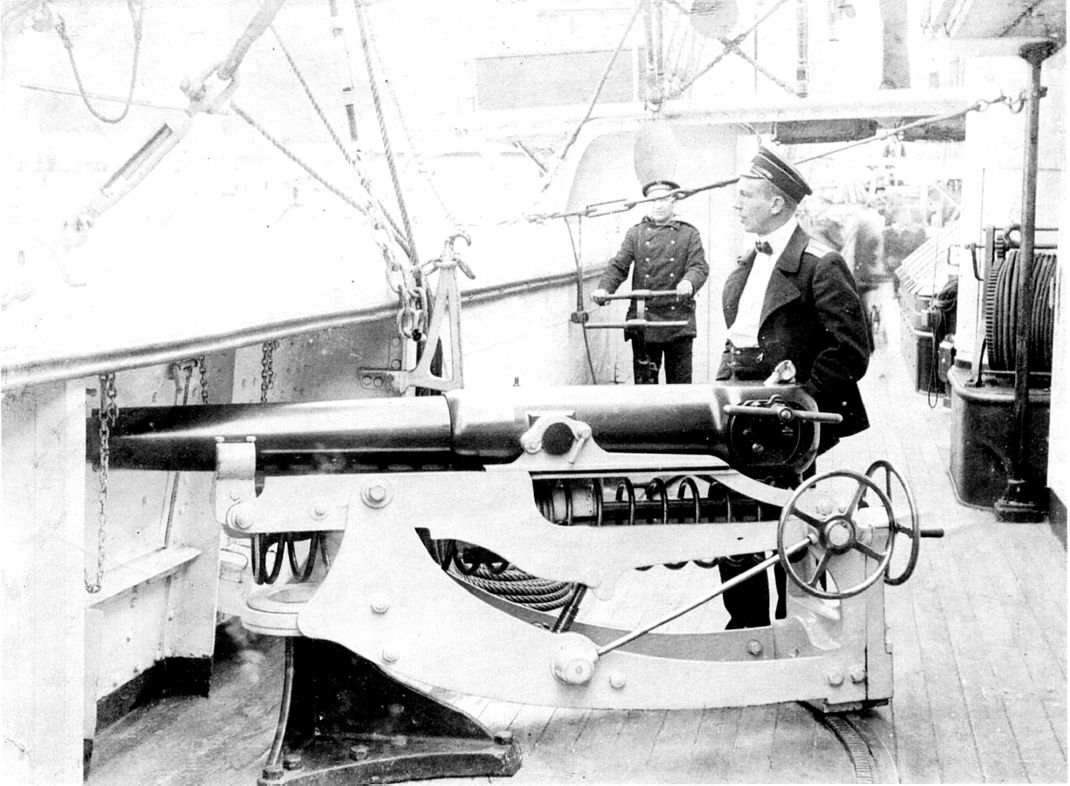 9-фунтовая пушка образца 1877 года на Забияке, 1902 год